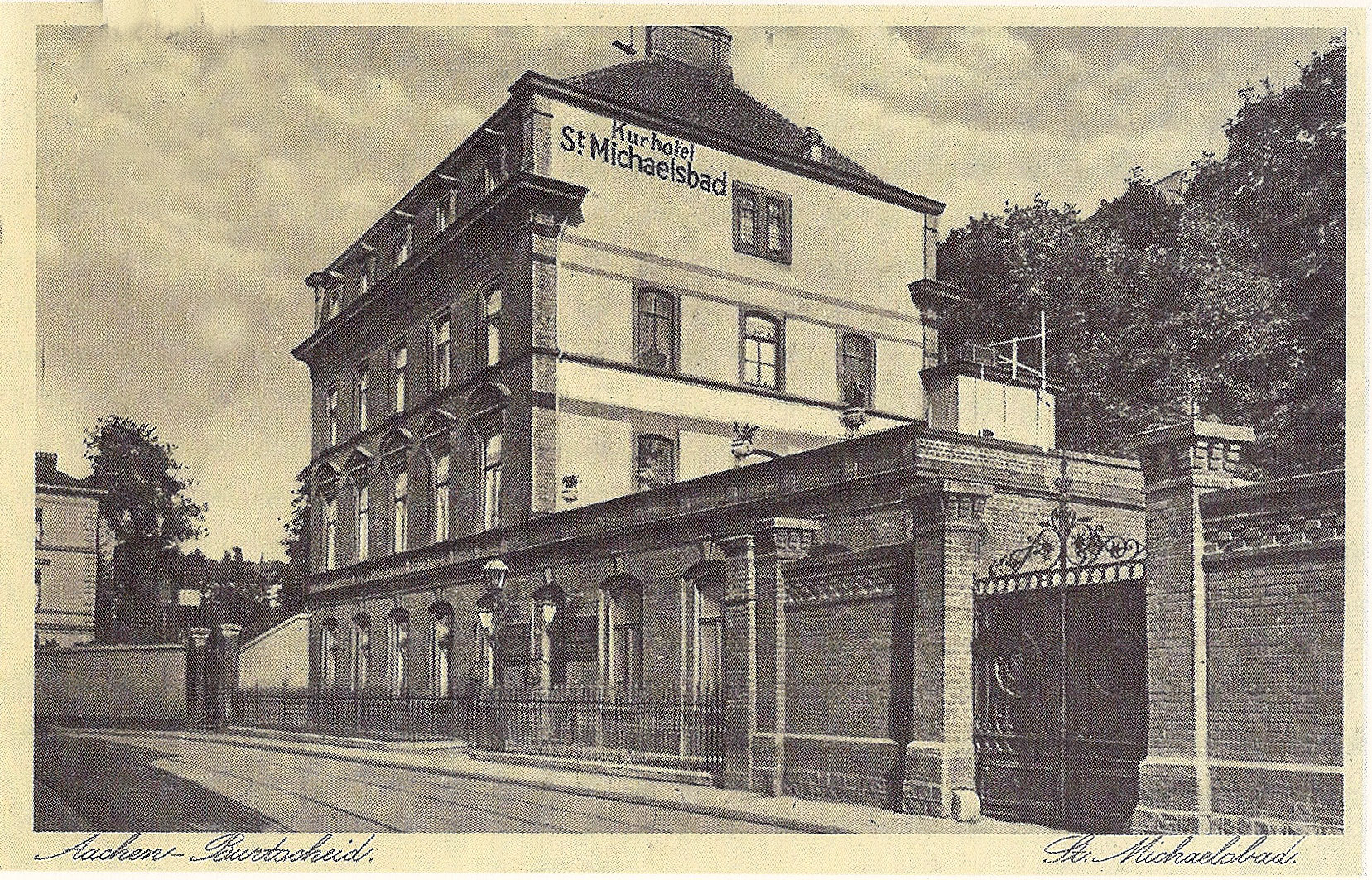 Aachen-Burtscheid. Michaelsbad auf der Dammstrasse